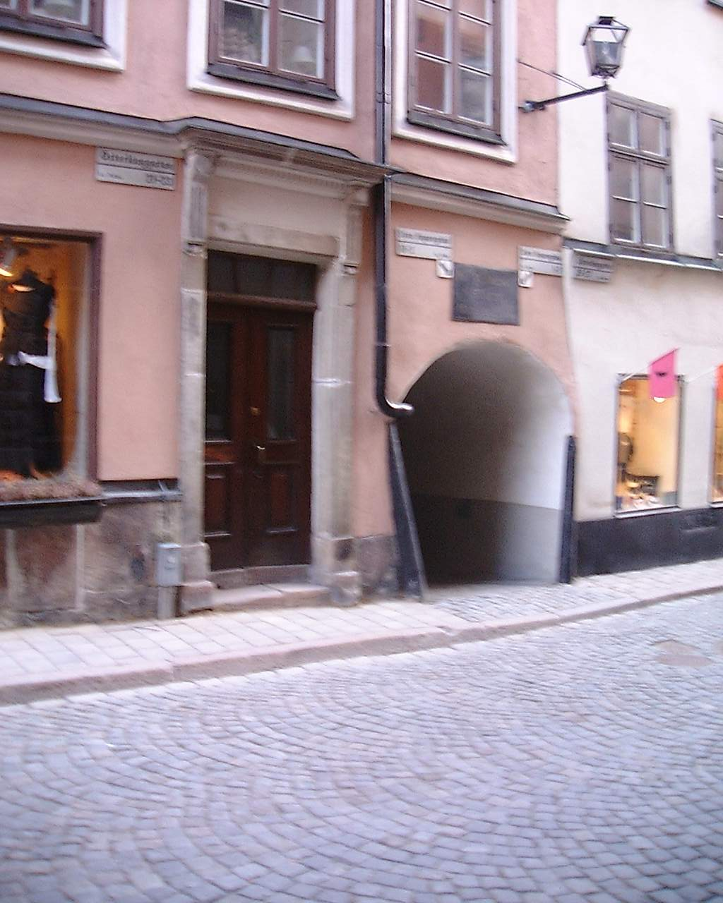 Vault of Stora Hoparegränd at Österlånggatan, Gamla stan, Stockholm.